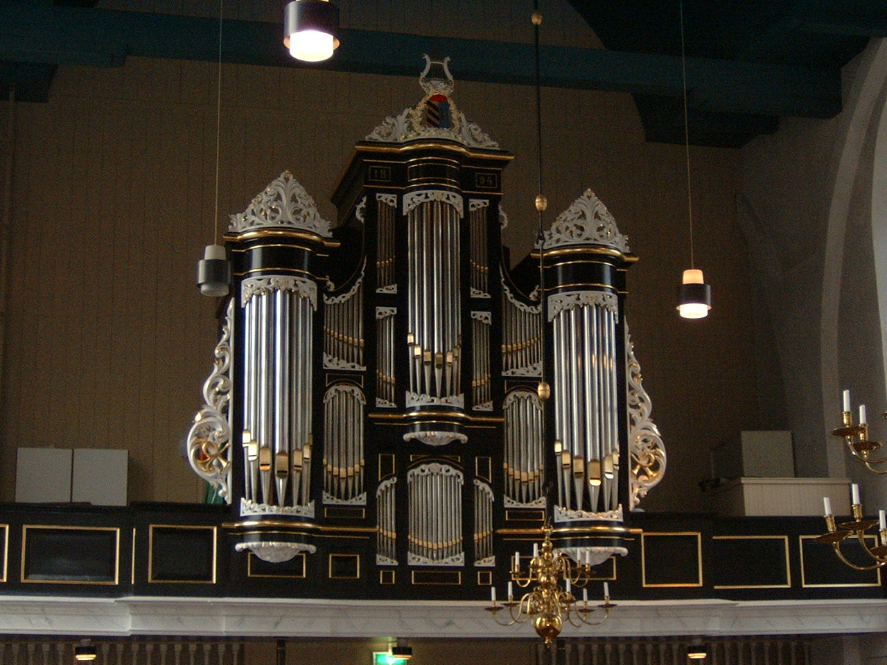 Kerkorgel Hollum (Ameland)